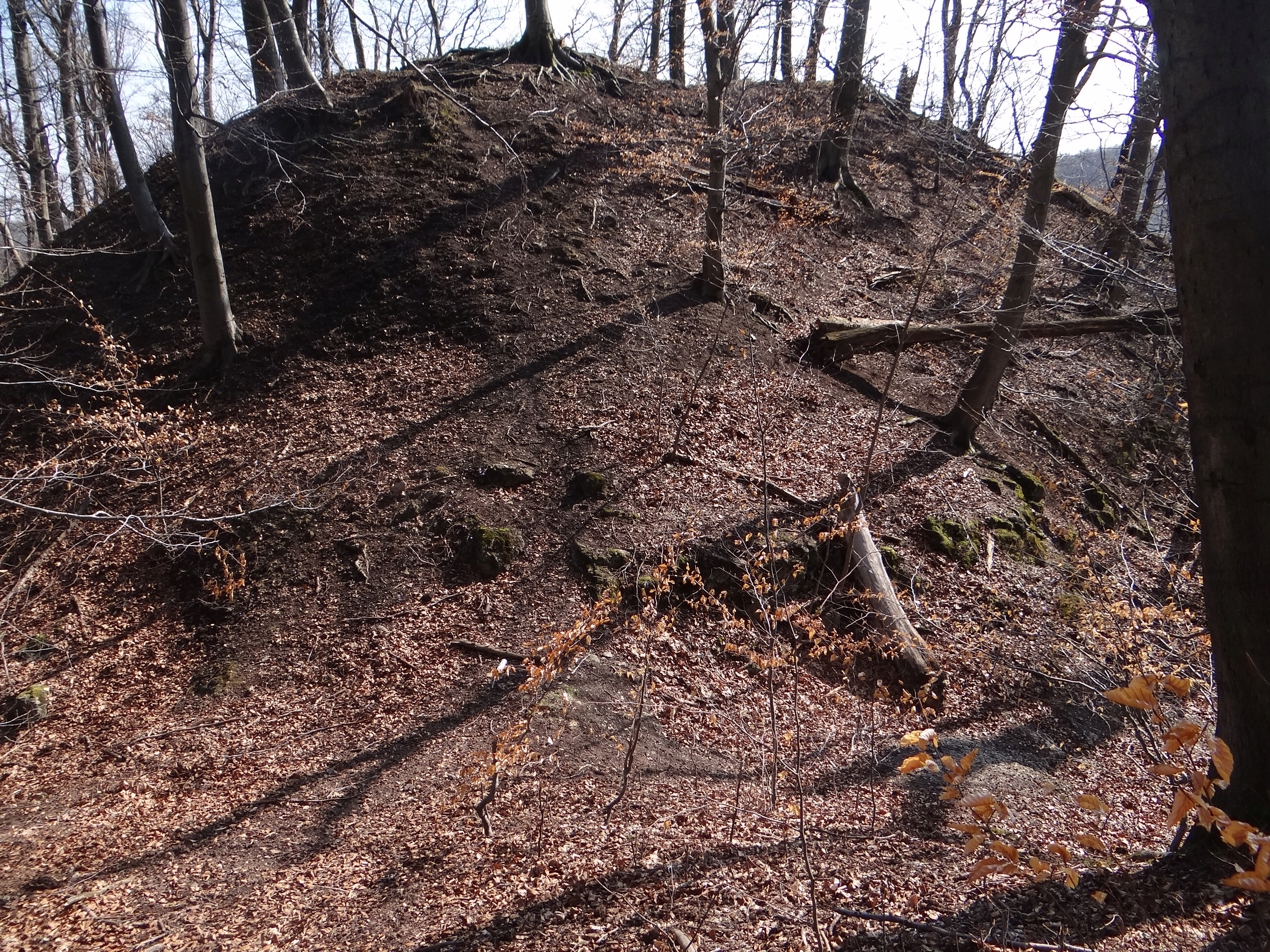 Szczyt Zamczyska w Dolinie Racławki